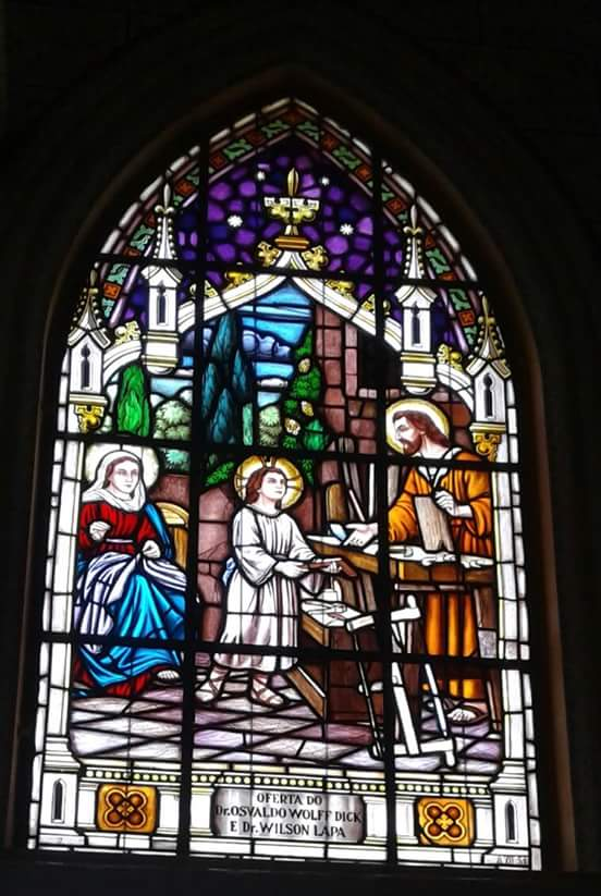 Vitral da Igreja Nosso Senhor do Bonfim de Braço do Norte, oferecido pelos médicos Oswaldo Wolff Dick e Vilson Lapa. Fotografia do bioquímico Roberto Pereira, Laboratório Santa Augusta, Braço do Norte.